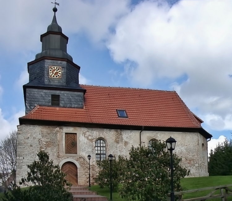 Kirche von Werningerode